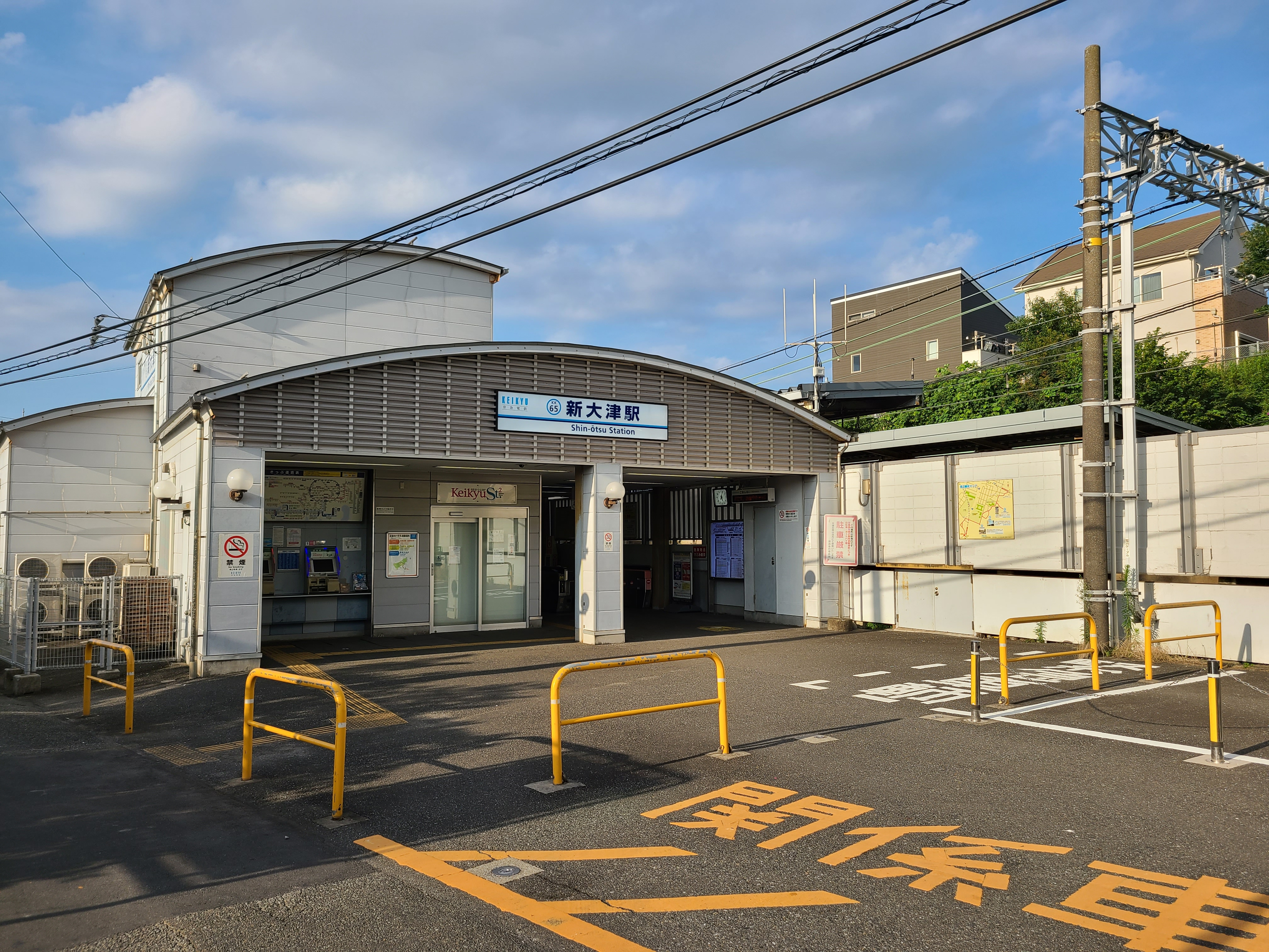 駅舎の別角度です。